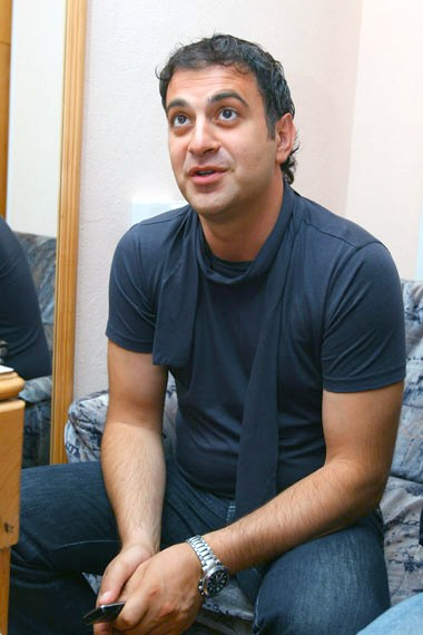 Mark Saghatelyan